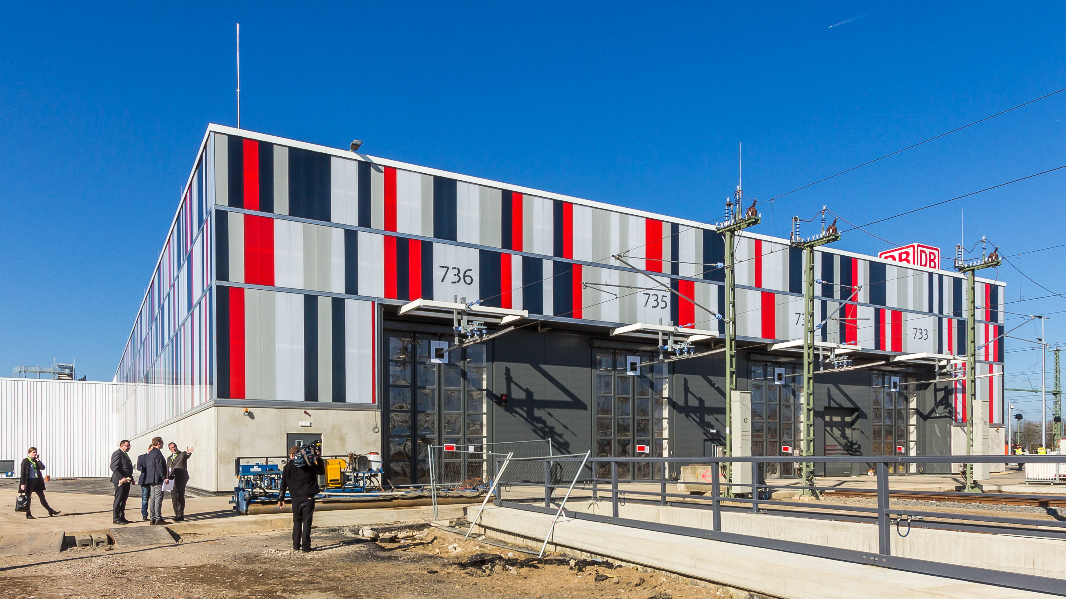 Besichtigung ICE-Instandhaltungswerk Köln-Nippes Februar 2018